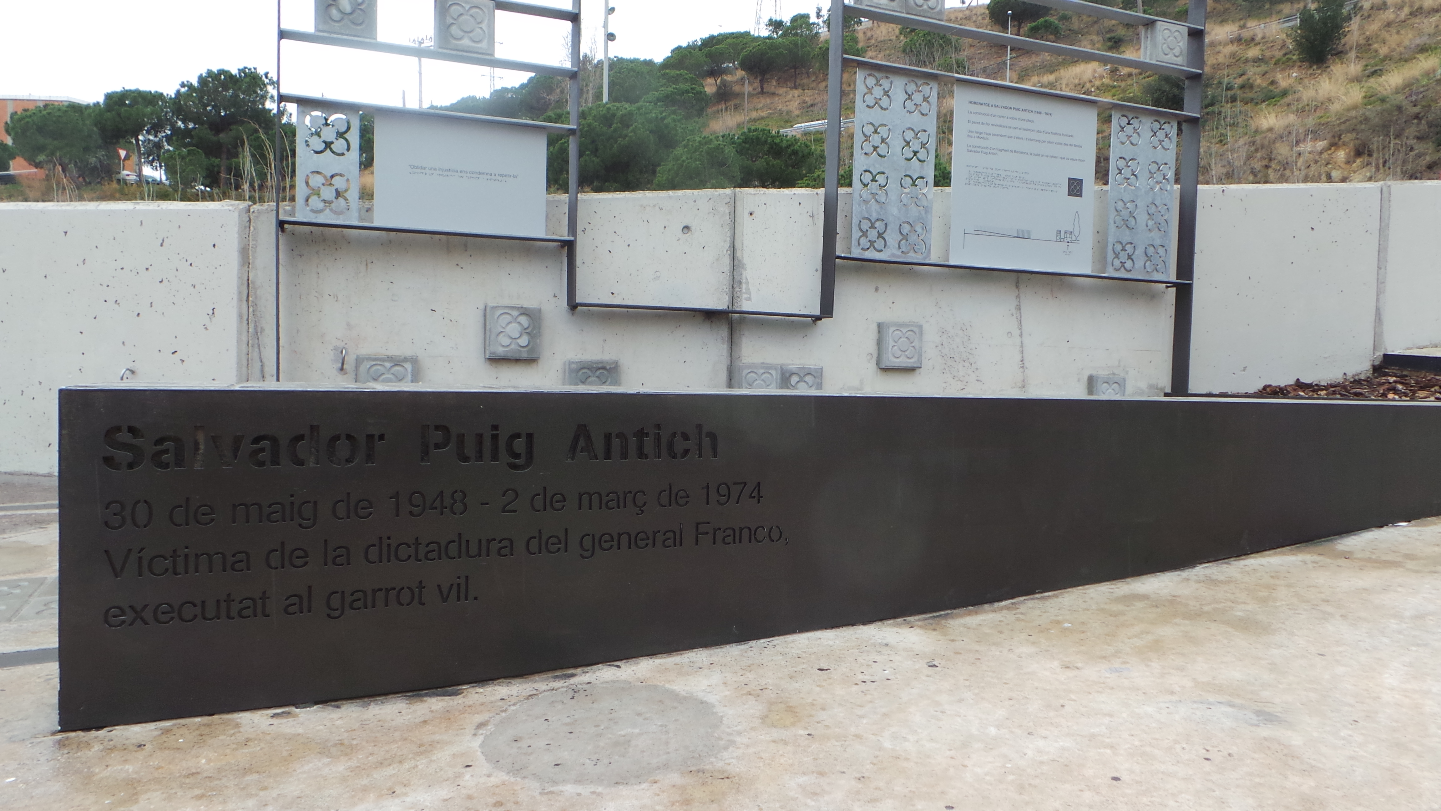 Plaza Salvador Puig Antich en Barcelona. Monumento en memoria del militante anarquista inaugurado en 2016